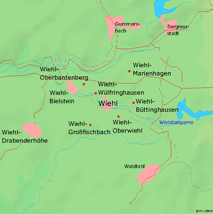 Karte der oberbergischen Stadt Wiehl und Umgebung, Kartenquelle: [1]